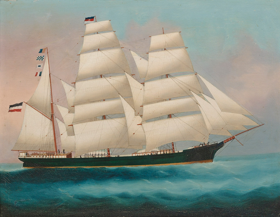 Kapitänsbild der Dreimastbark "Richard Rickmers" auf offener See. Öl auf Seide, 45,5 cm x 59 cm. Zum Schiff: Richard Rickmers (1881) → Dora, hölzerne Bark, 1881–1899